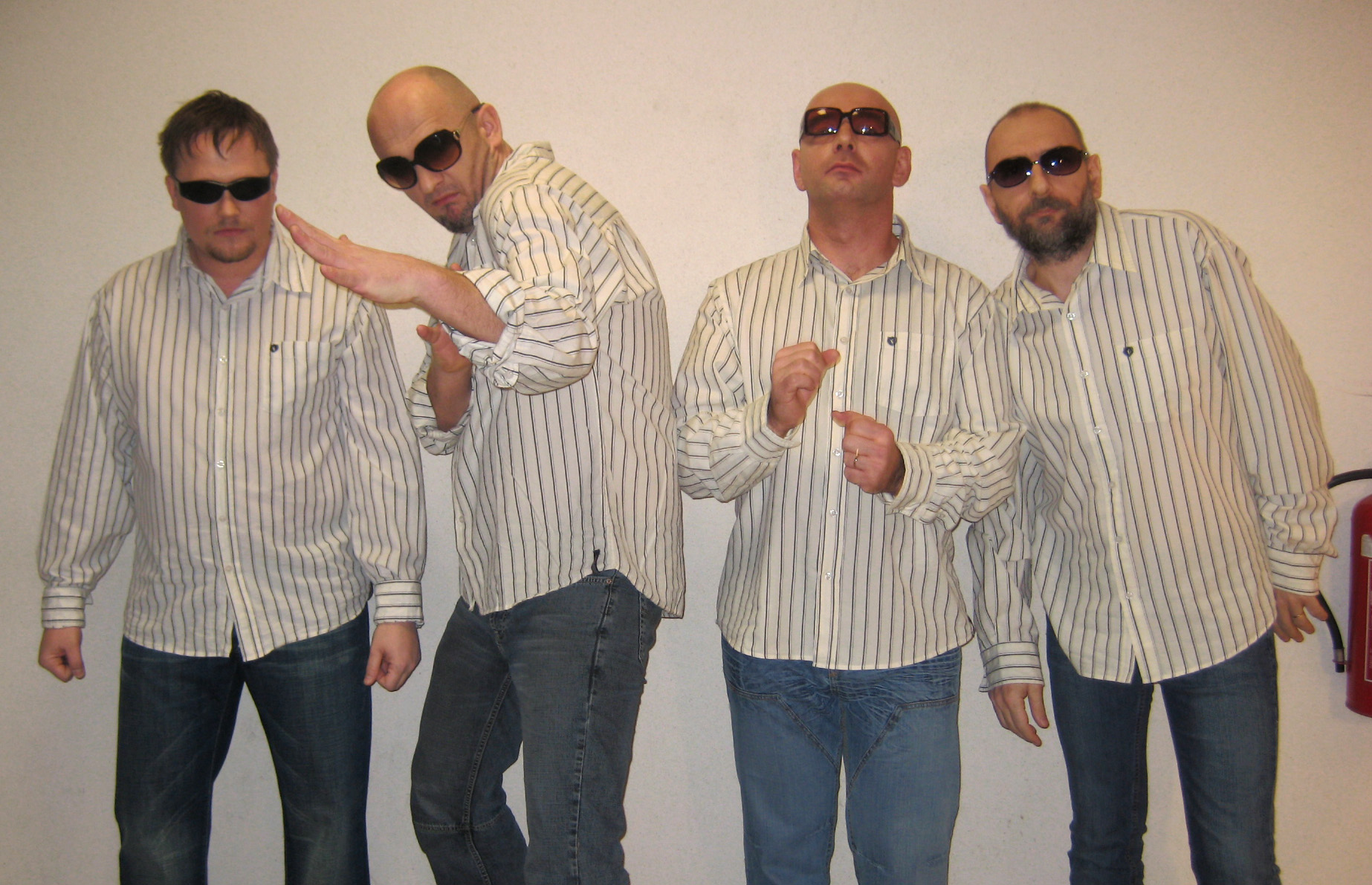 Male malice, slovenian pop group